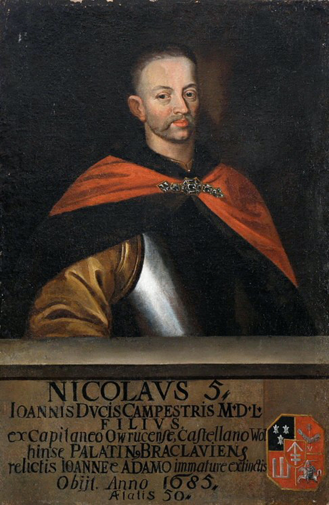 Беларуская (тарашкевіца): Партрэт Мікалая Лявона Сапегі (Mikałaj Lavon Sapieha) гербу «Ліс» (1644—1683), дзяржаўнага і вайсковага дзеяча Вялікага Княства Літоўскага, кашталяна валынскага і ваяводы брацлаўскага